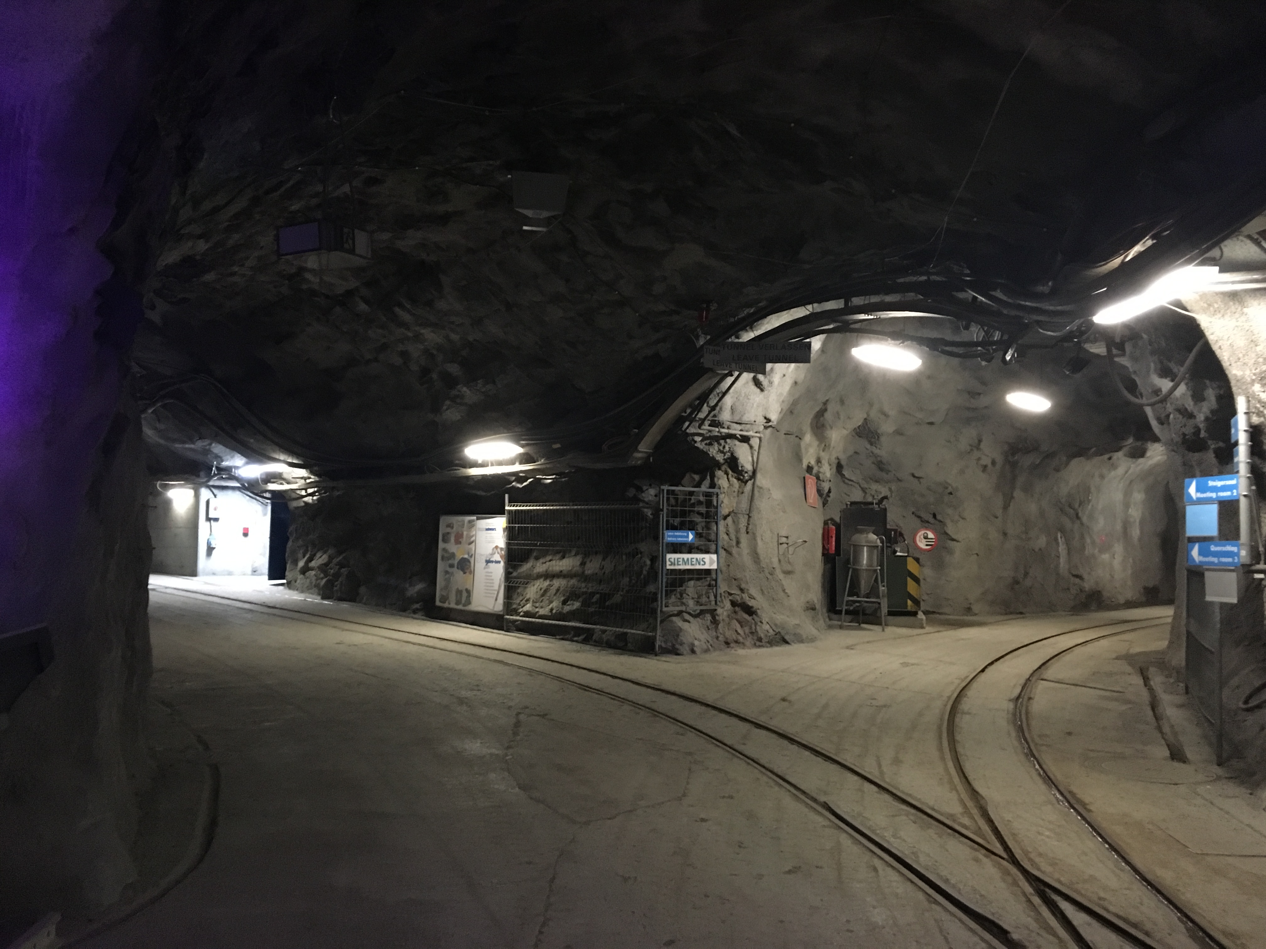 Eingangsbereich des Versuchsstollens Hagerbach, ca. 100 hinter dem Haupteingang. Aufgenommen am 28.08.2018.